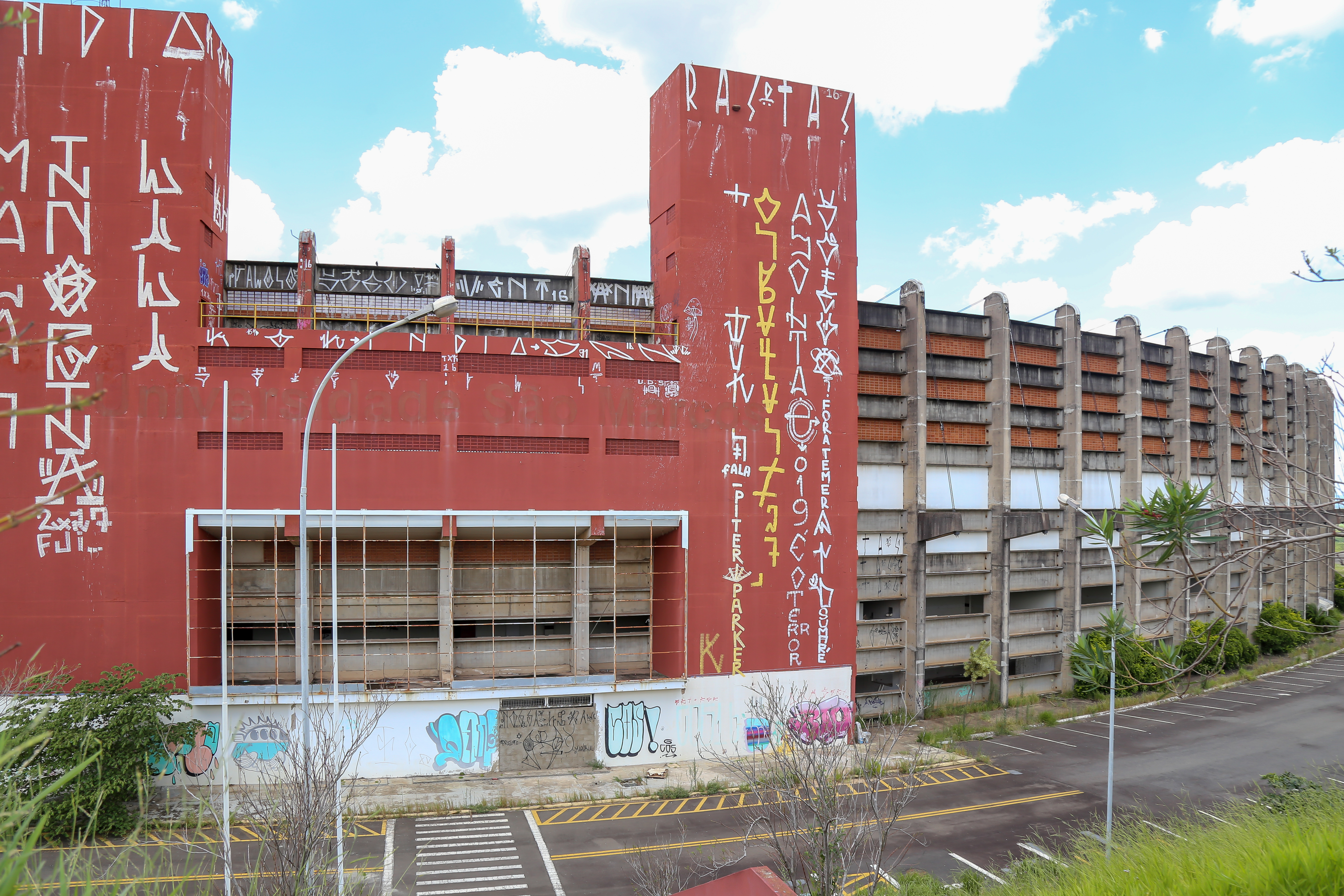 Vista da parte externa do Sambódromo de Paulínia, no início de 2018, antes de ser reformado